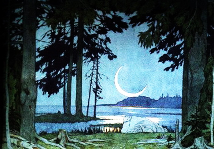 Декорации к Садко